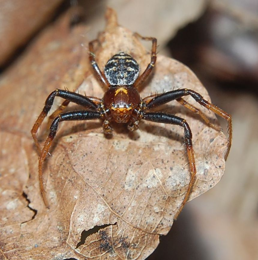 Xysticus lanio, Männchen. Forst Jungfernheide, Berlin. Bestimmung genitalmorphologisch durch K.-H. Kielhorn, Berlin